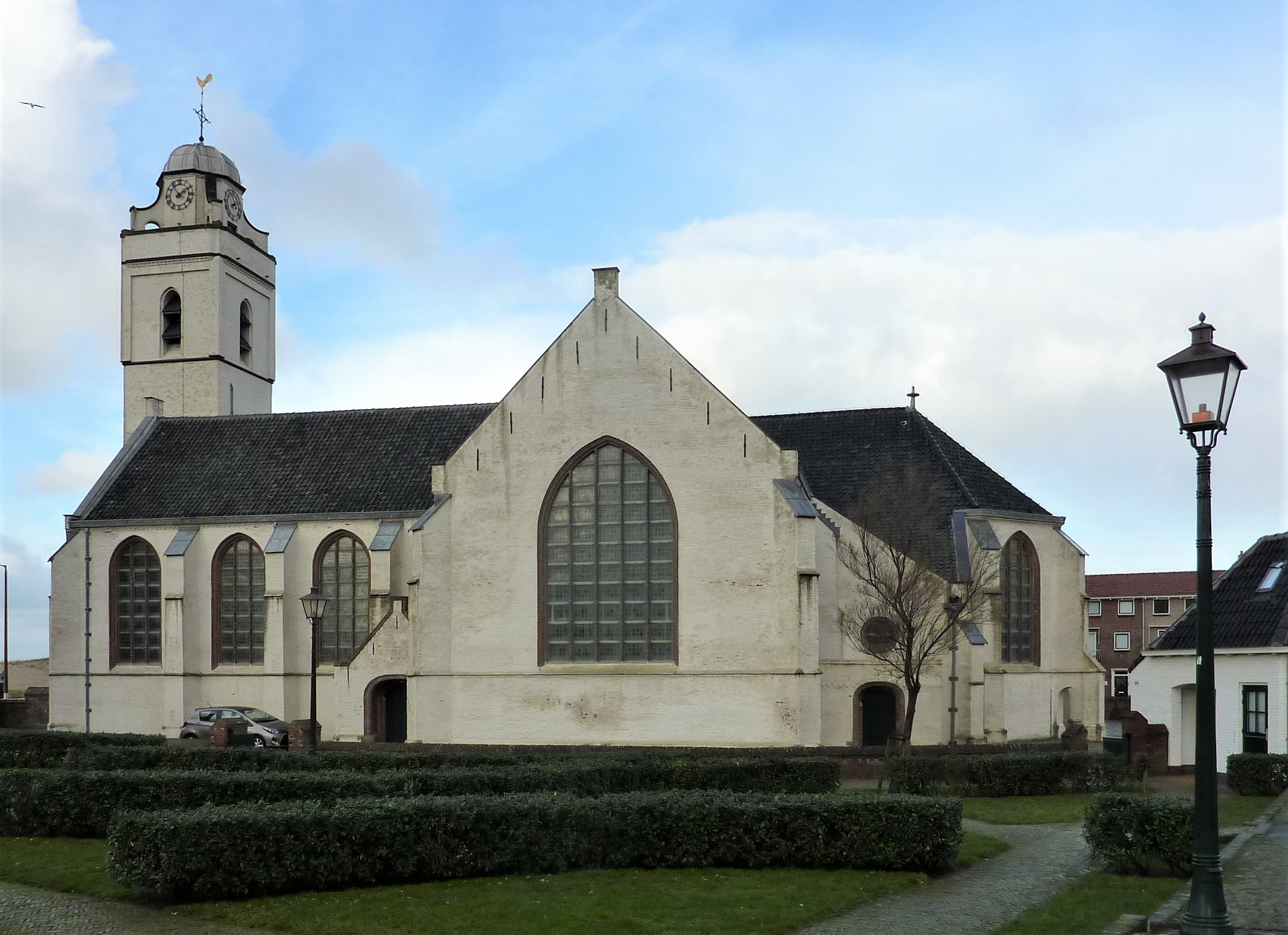 Andreaskerk (Katwijk aan Zee)